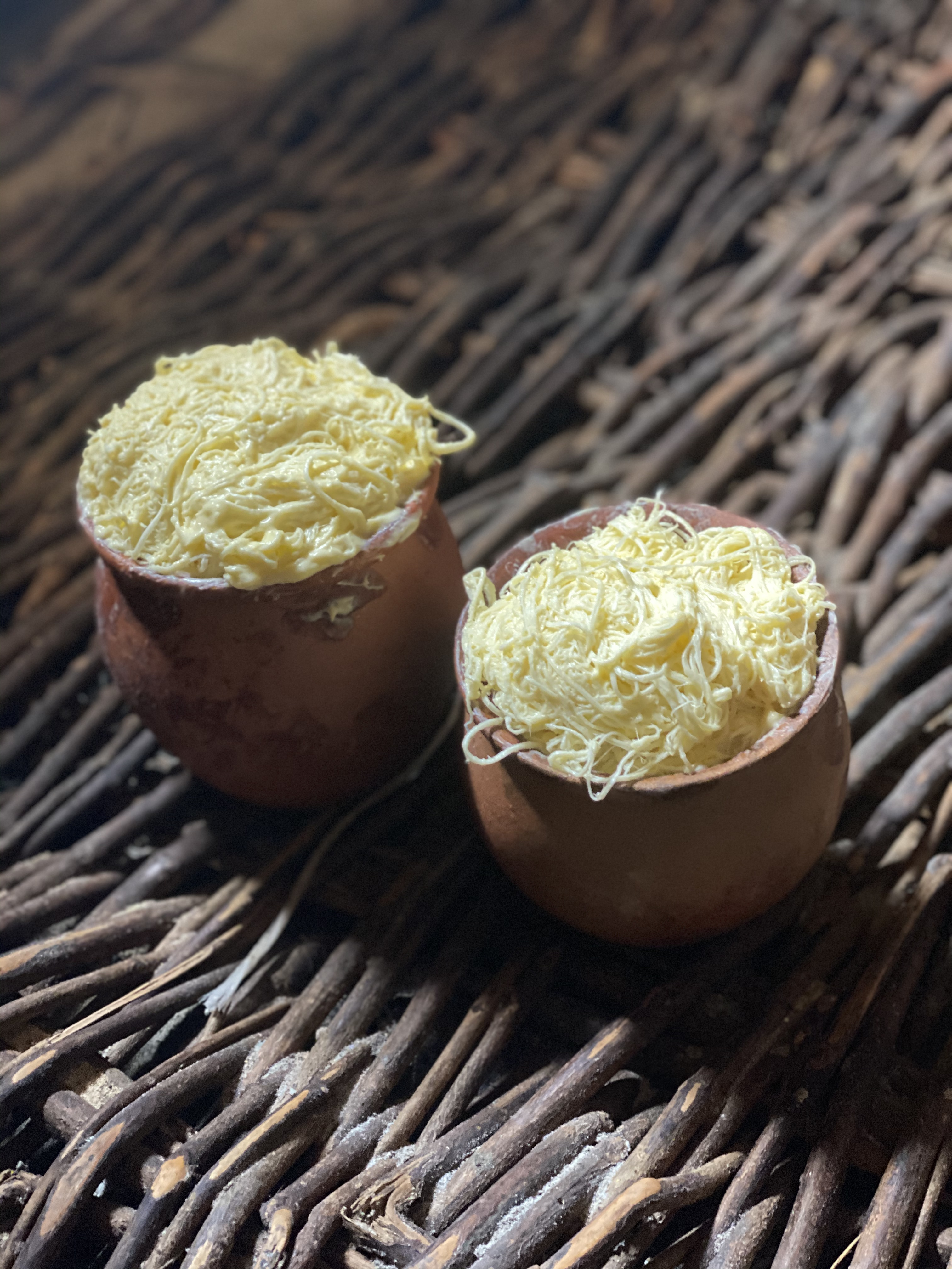 ტენილი